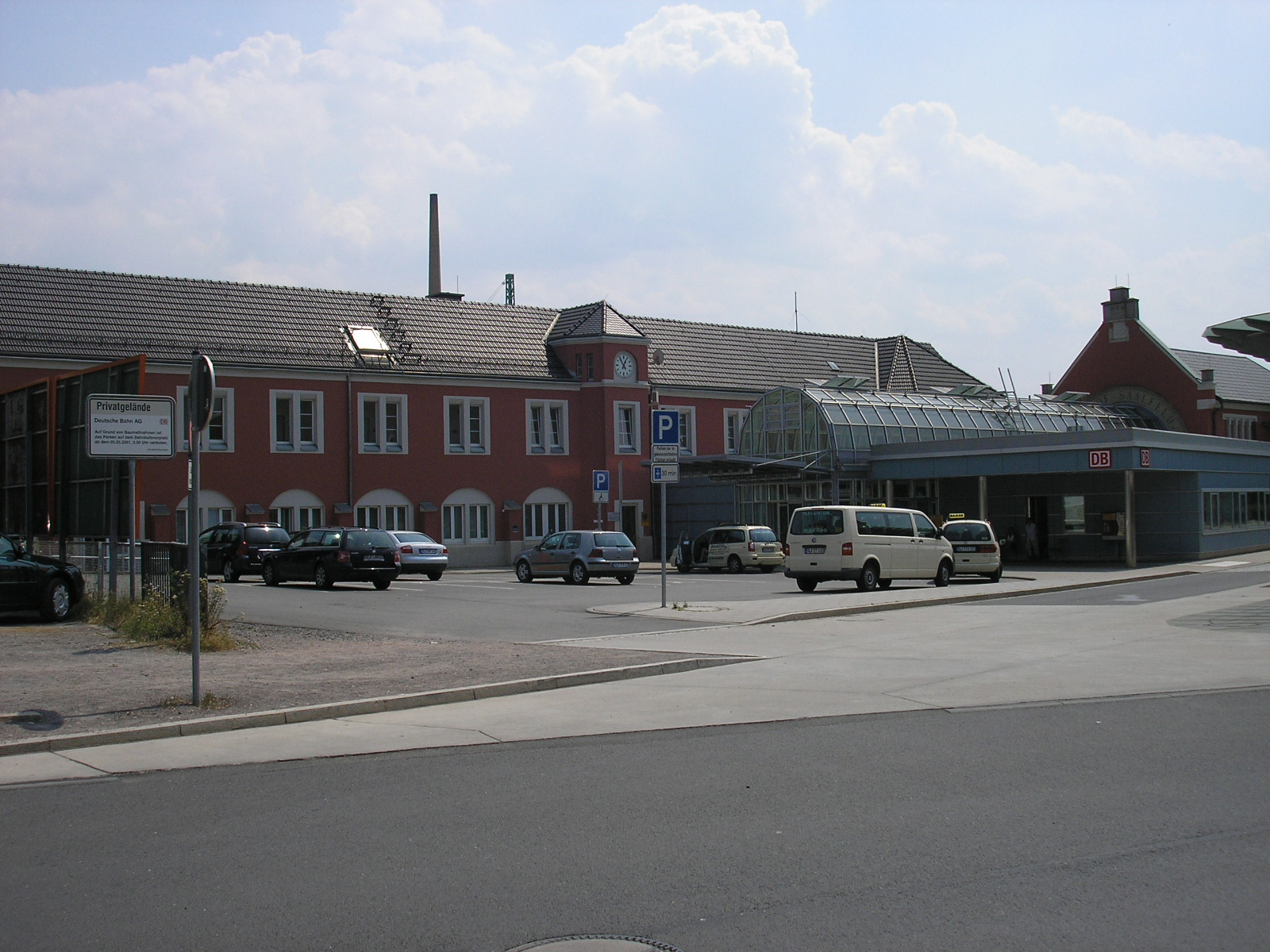 Das Bahnhofsgebäude von Saalfeld (Thüringen).